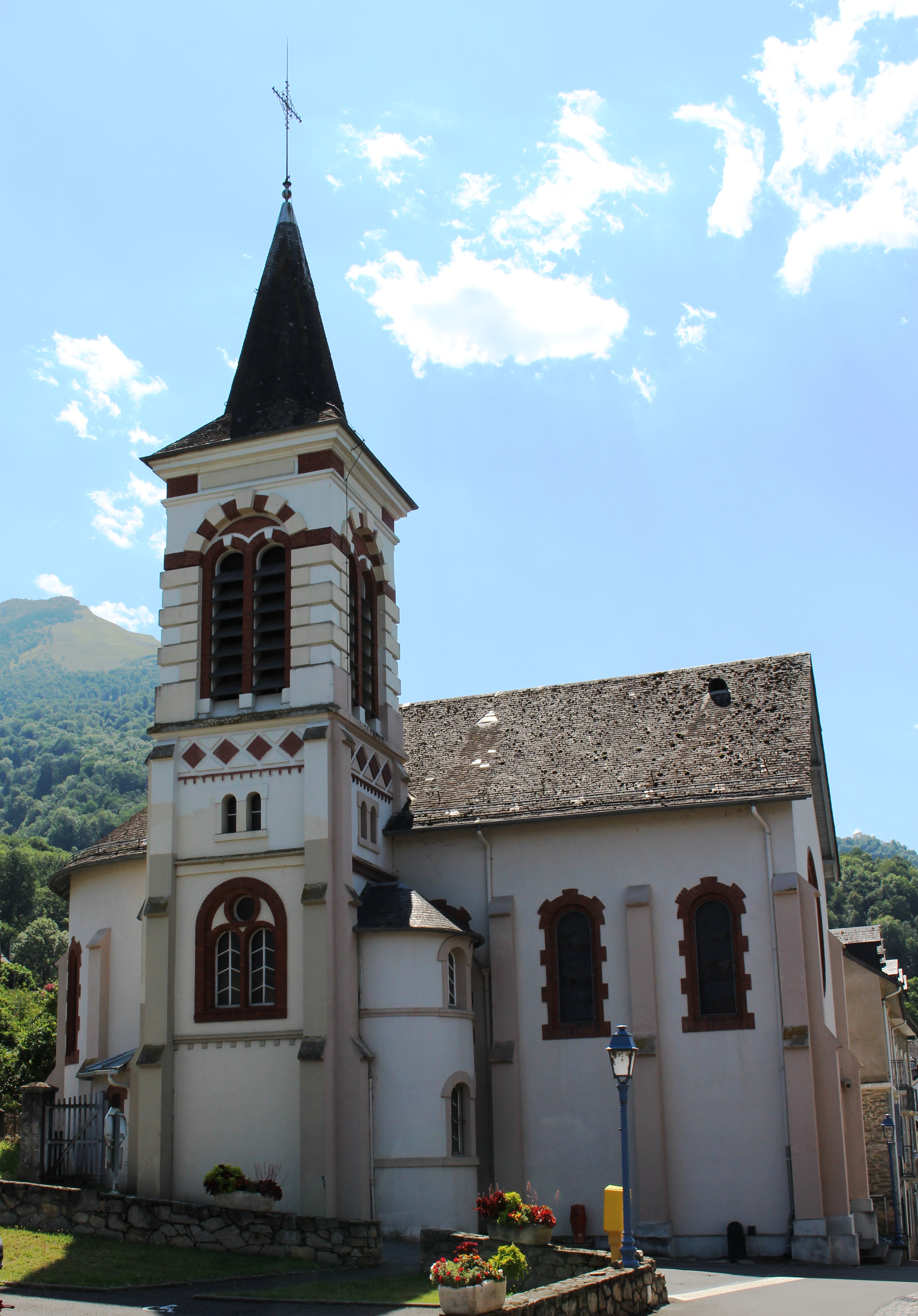 Église Saint-Vincent de Beaucens (Hautes-Pyrénées)